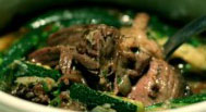 изображено приготовленное мясо из баранины с луком и чесноком